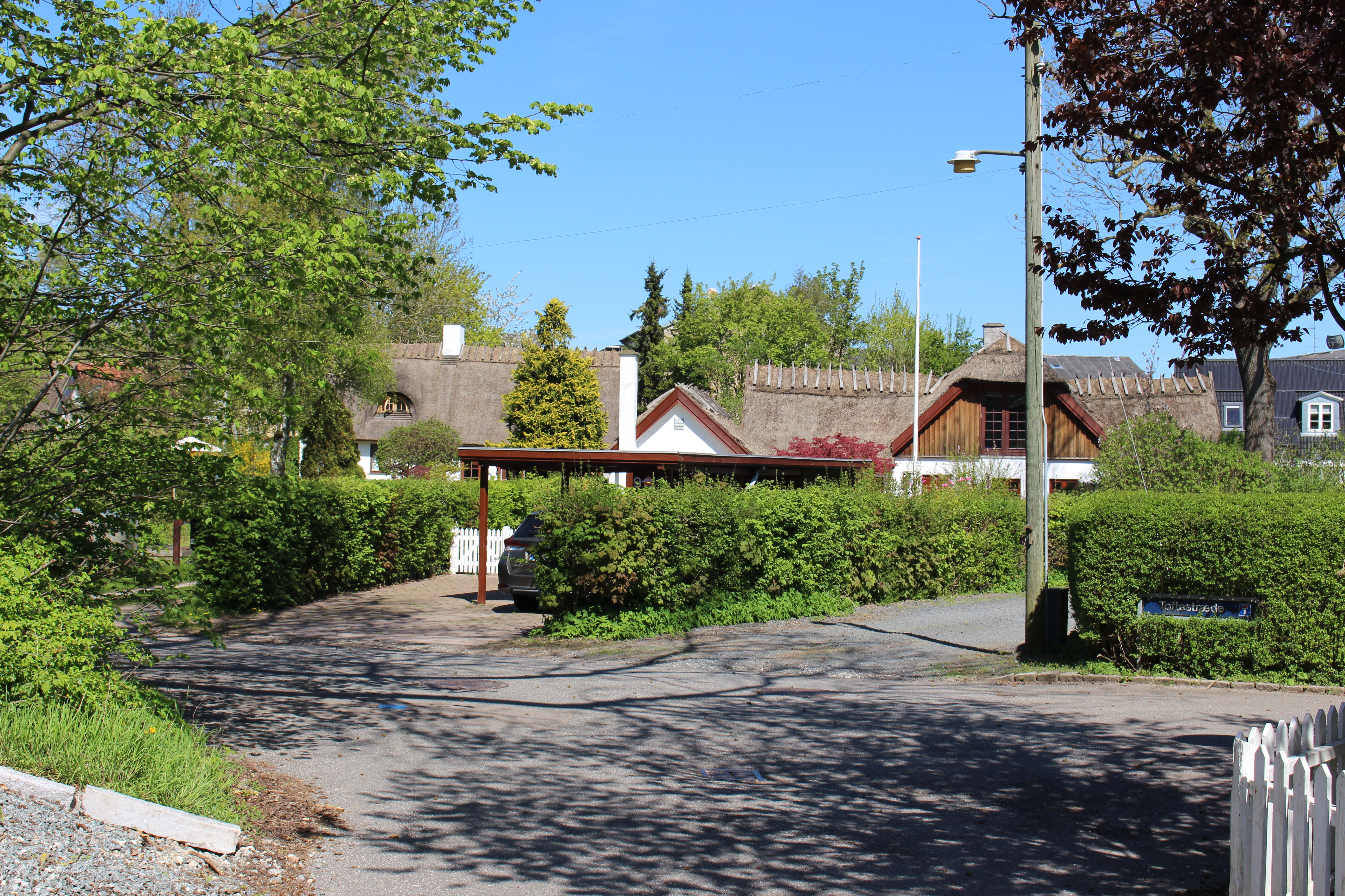 Stråtagshuse i Vridsløselille